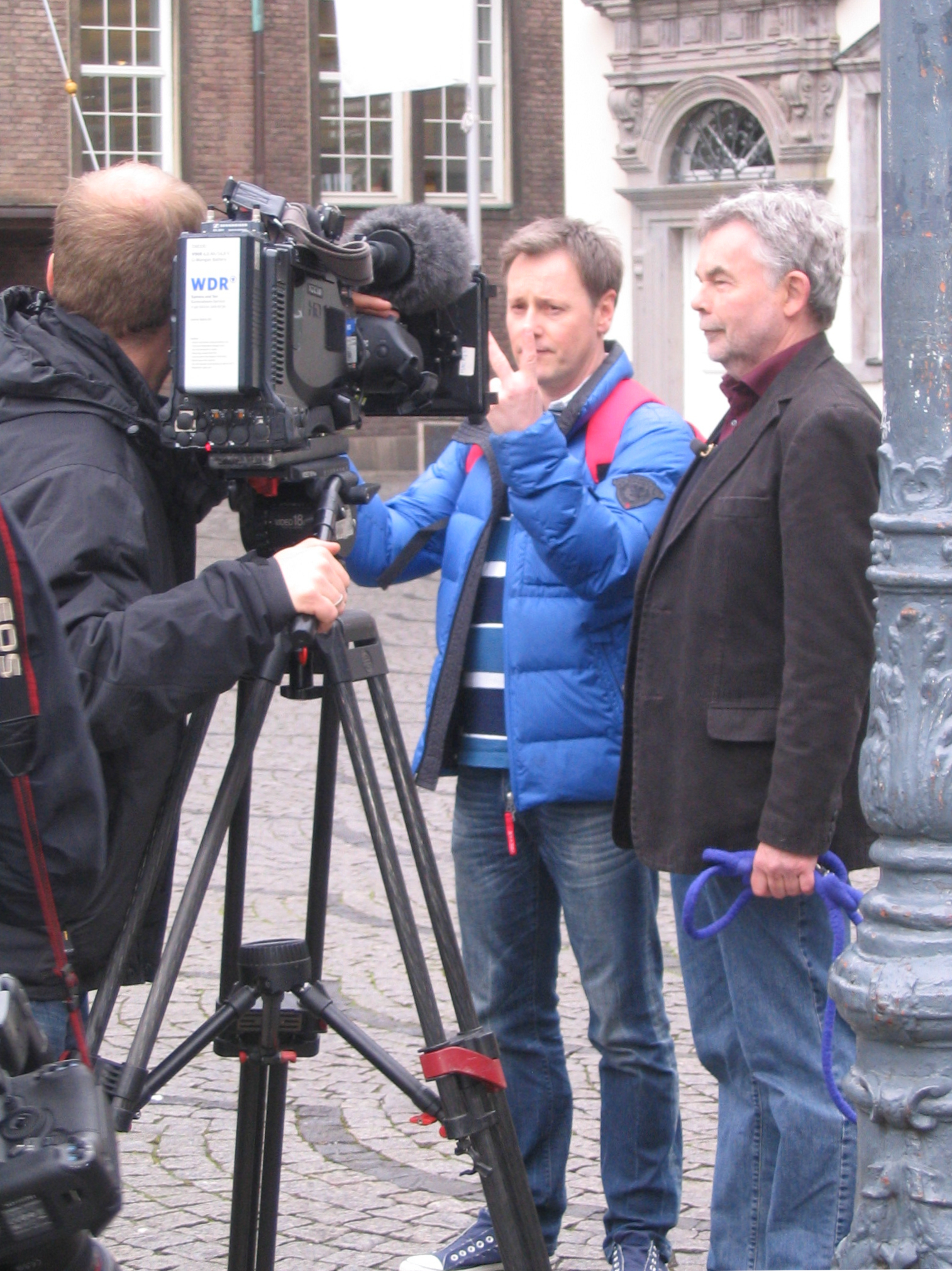 Manfred „Manni“ Breuckmann bei Fernsehaufnahmen vor dem Düsseldorfer Rathaus am 10. April 2012. Für die Reihe „Wunderschön“ im WDR, ein Film über Düsseldorf. Moderator Stefan Pinnow. Manni Breuckmann, Radio-Legende mit Herz für Fortuna, Altbier und seine Wahlheimat Düsseldorf, gibt den prominenten Fremdenführer (Express, Düsseldorf). Ausgestrahlt wird die Sendung am 20. Mai 2012.